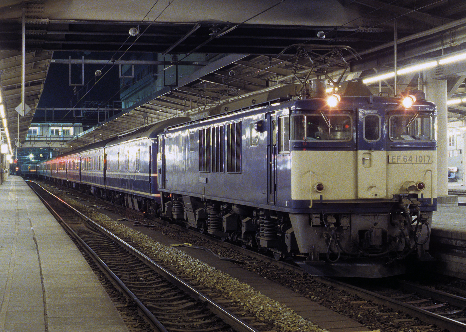 国鉄EF64 1017けん引 国鉄20系客車 急行「天の川」